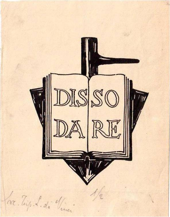 Una vanga con inserito un libro sul quale è scritto il motto "Dissodare"